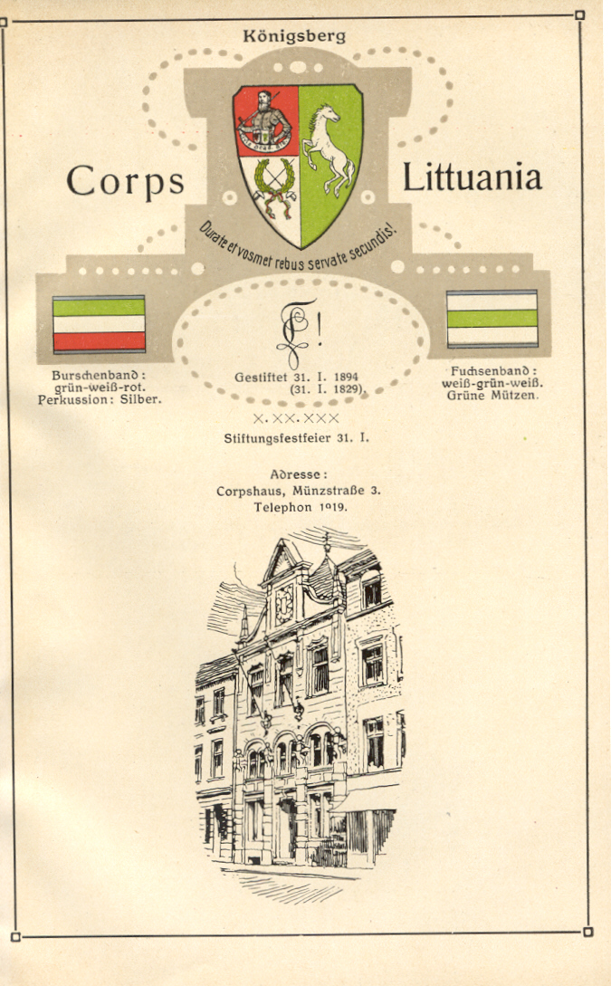 Wappen, Couleur und Corpshaus der Littuania Königsberg